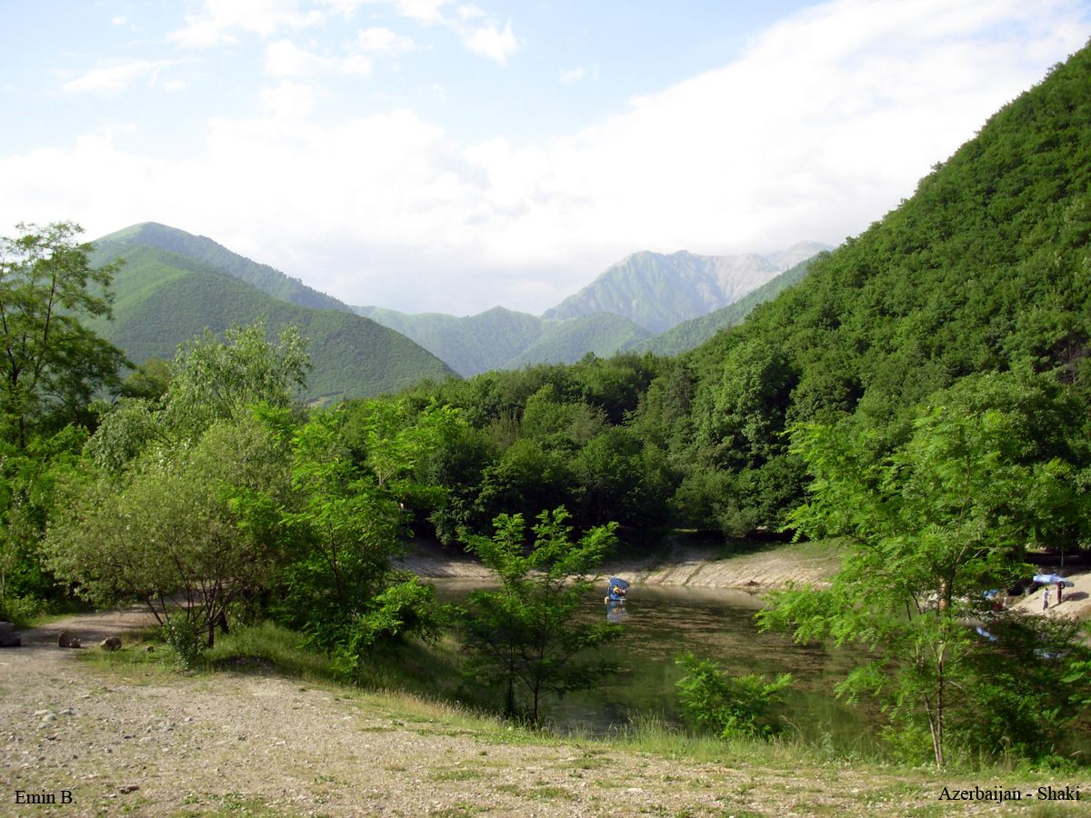 Природа Азербайджана, Шеки